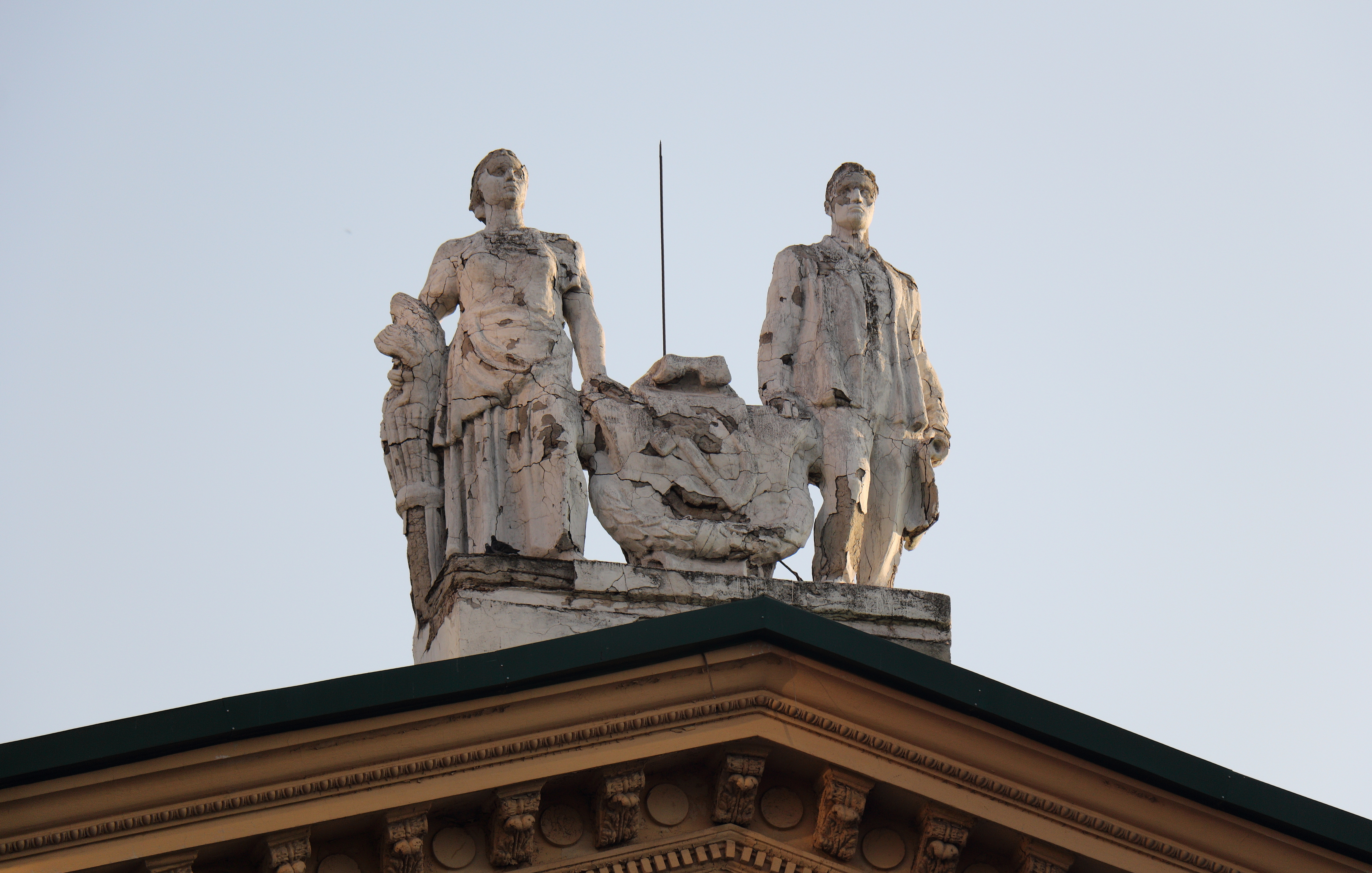 Дворец культуры завода «Ростсельмаш»: пр. Сельмаш, 3, Ростов-на-Дону, Ростовская область